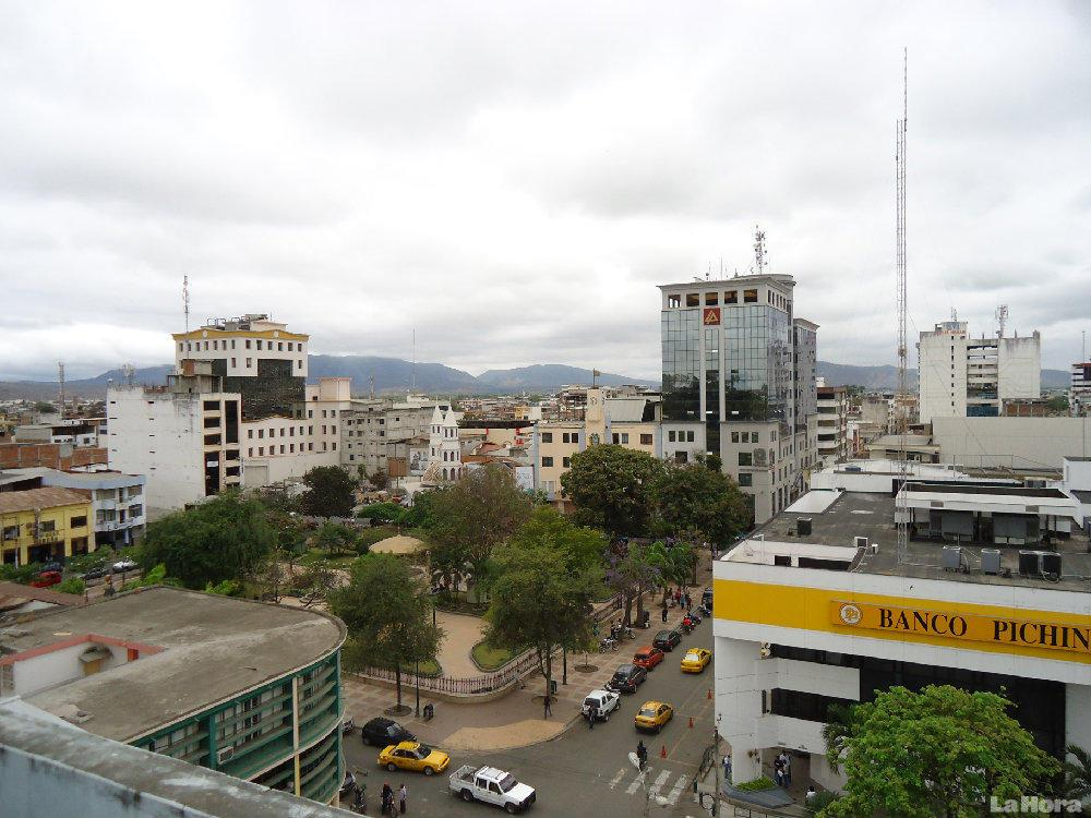 Vista Aérea del parque Vicente Amador Flor